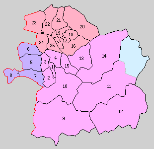 福井県大野郡の町村制時点の町村。